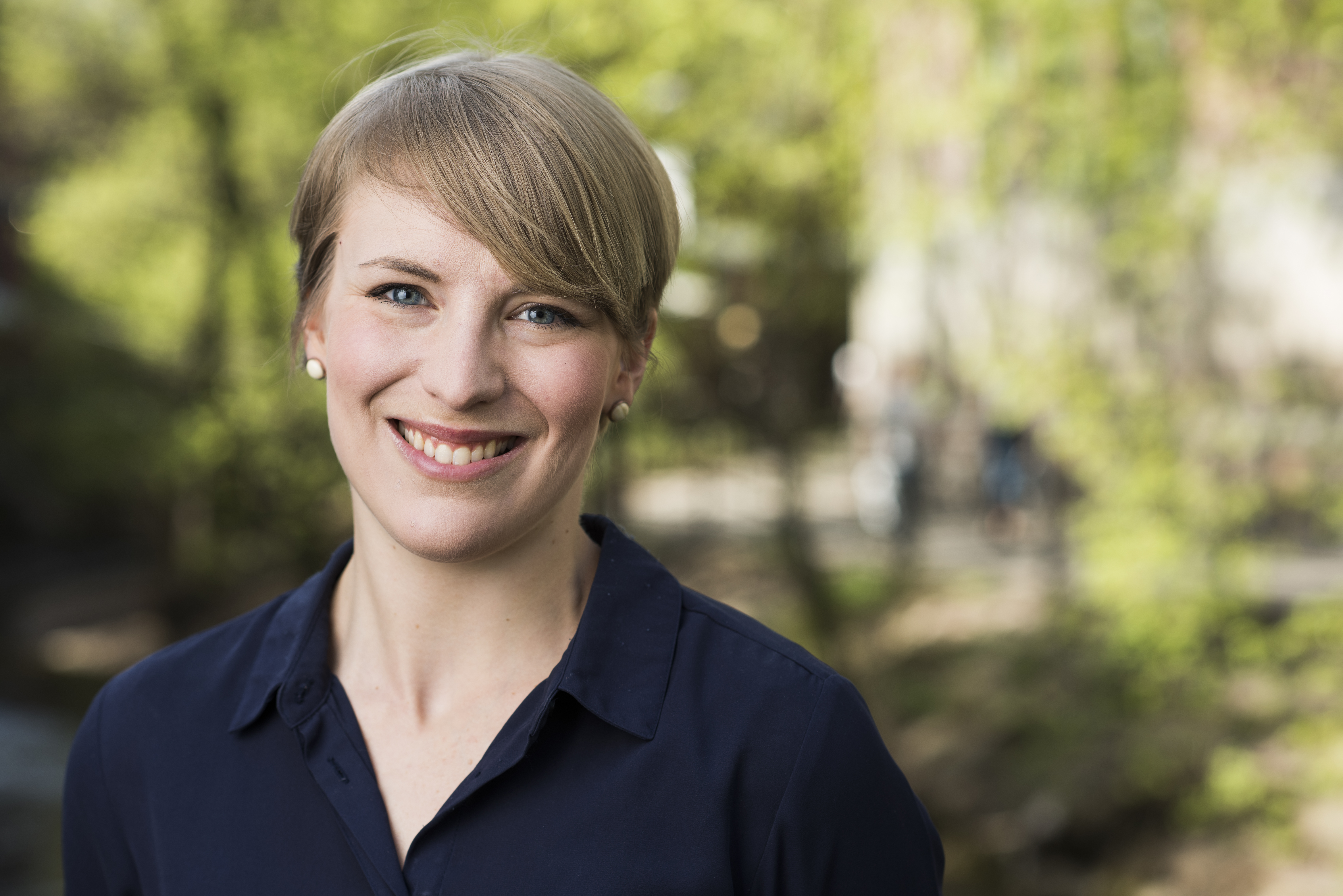 KAri Elisabeth Kaski